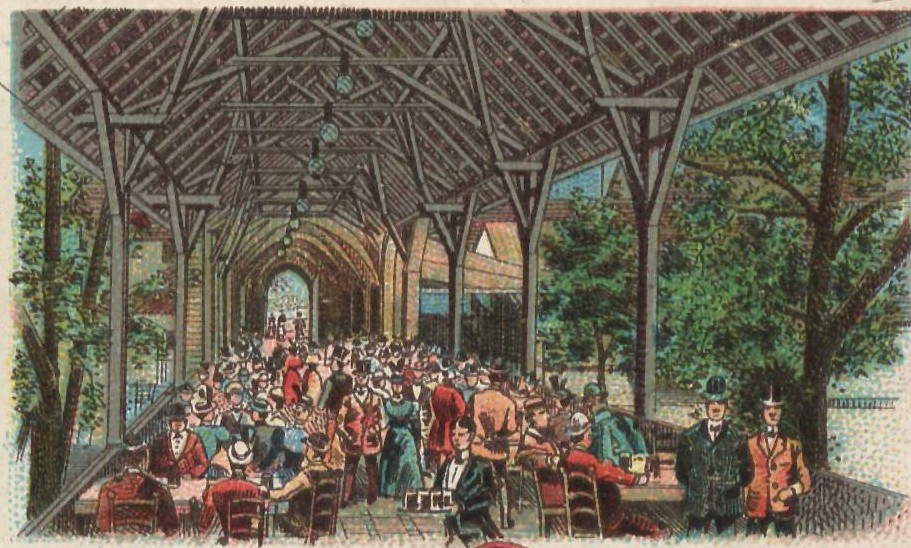 “Abtei“ in Treptow, Ausschnitt